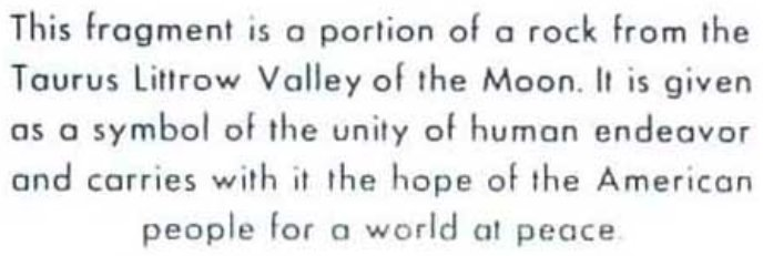 Apollo 17 Goodwill message placque